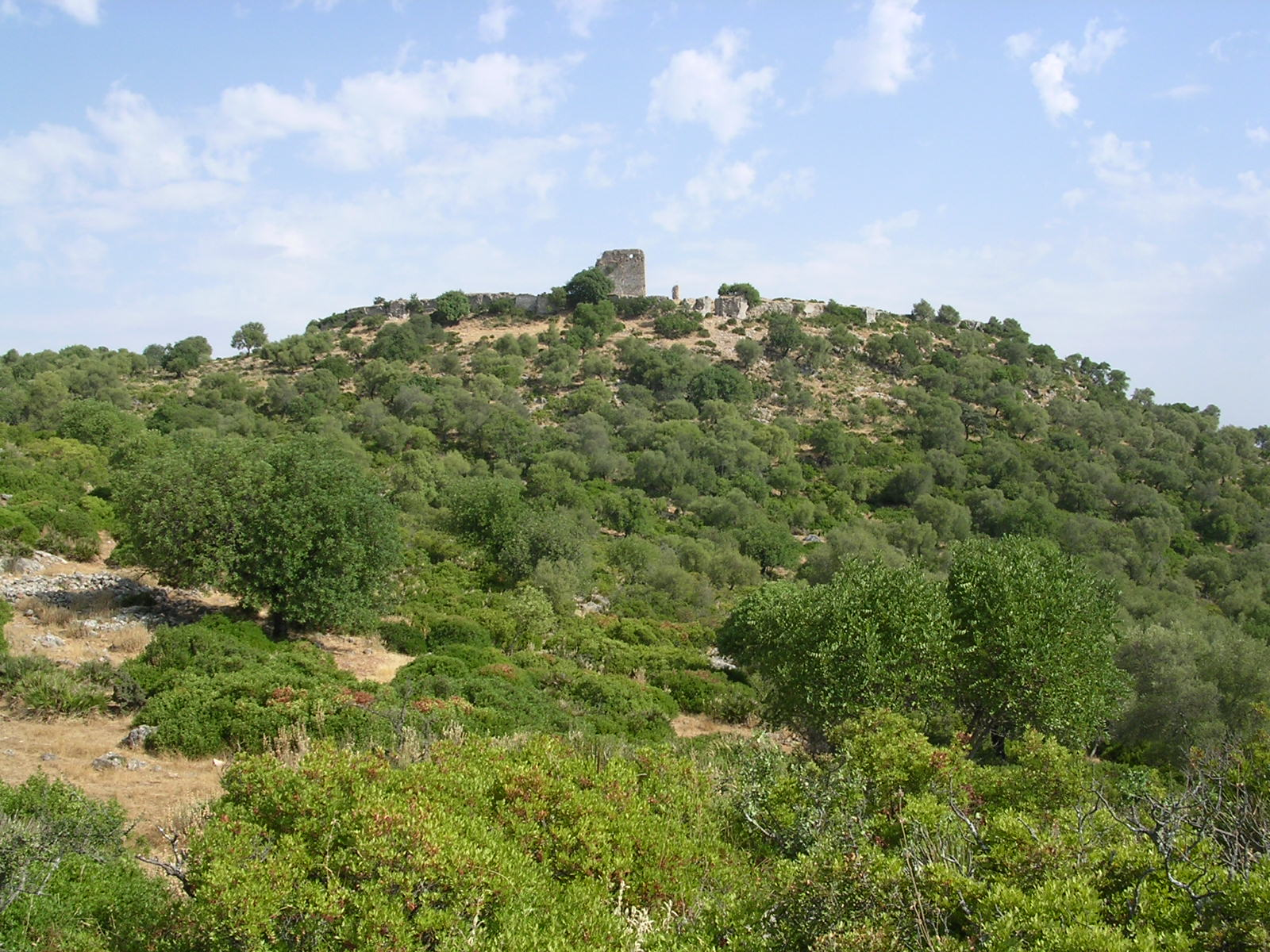 Castillo de Matrera, en el término municipal de Villamartín (Cádiz).